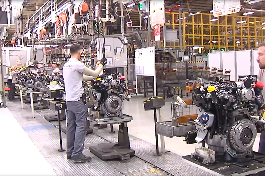 Visita a la factoría de Renault en Valladolid.